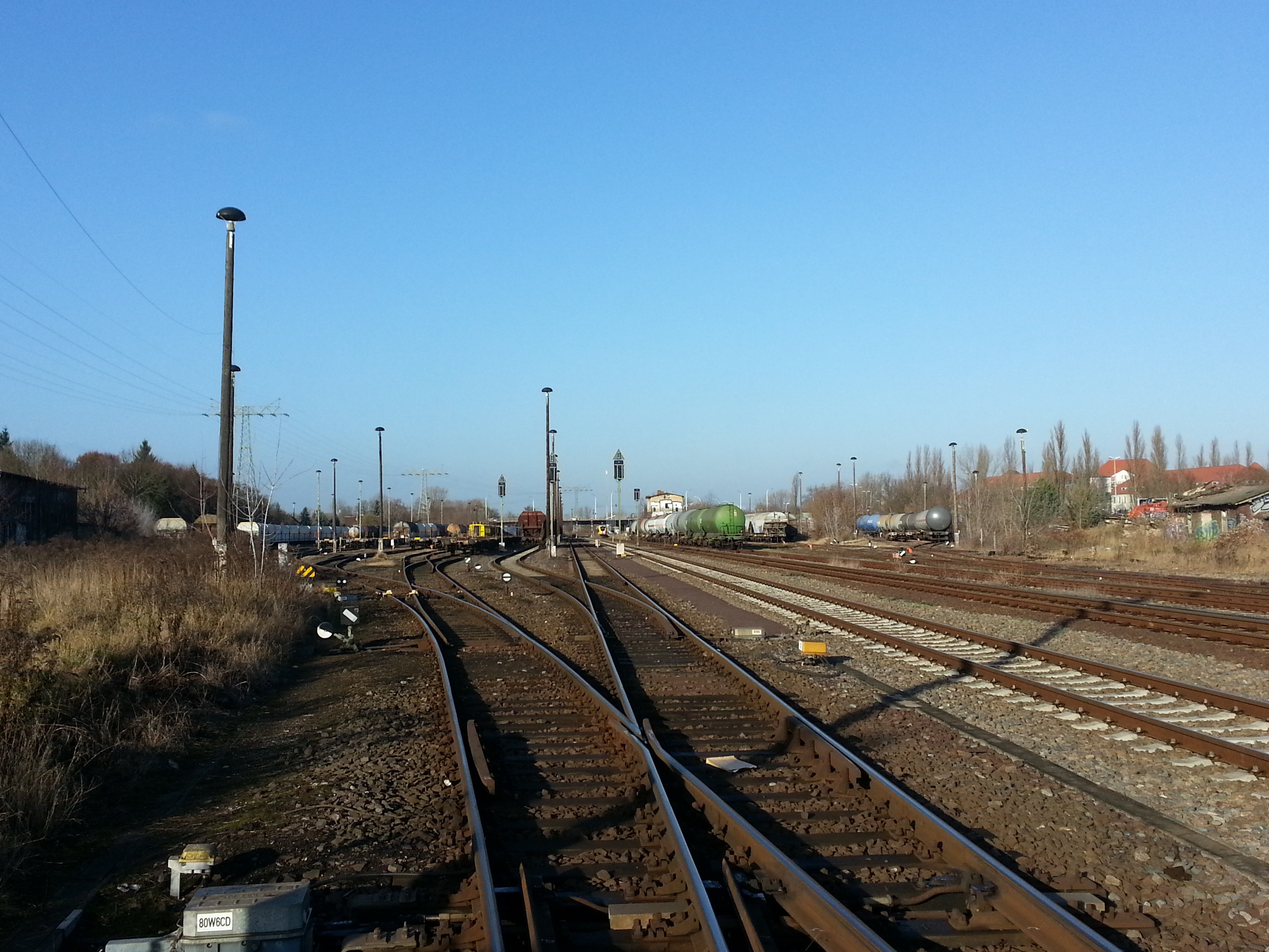 gleisanlagen im altstädtischen bahnhof brb